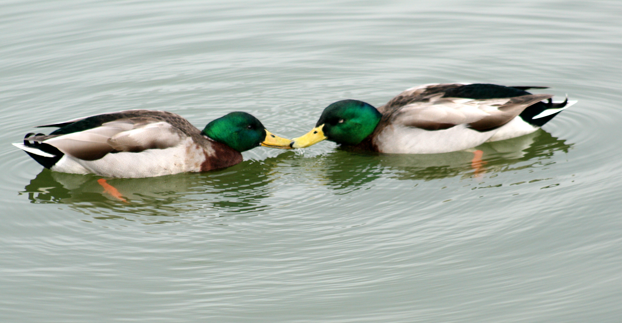 Males Anas platyrhynchos (Mallard)